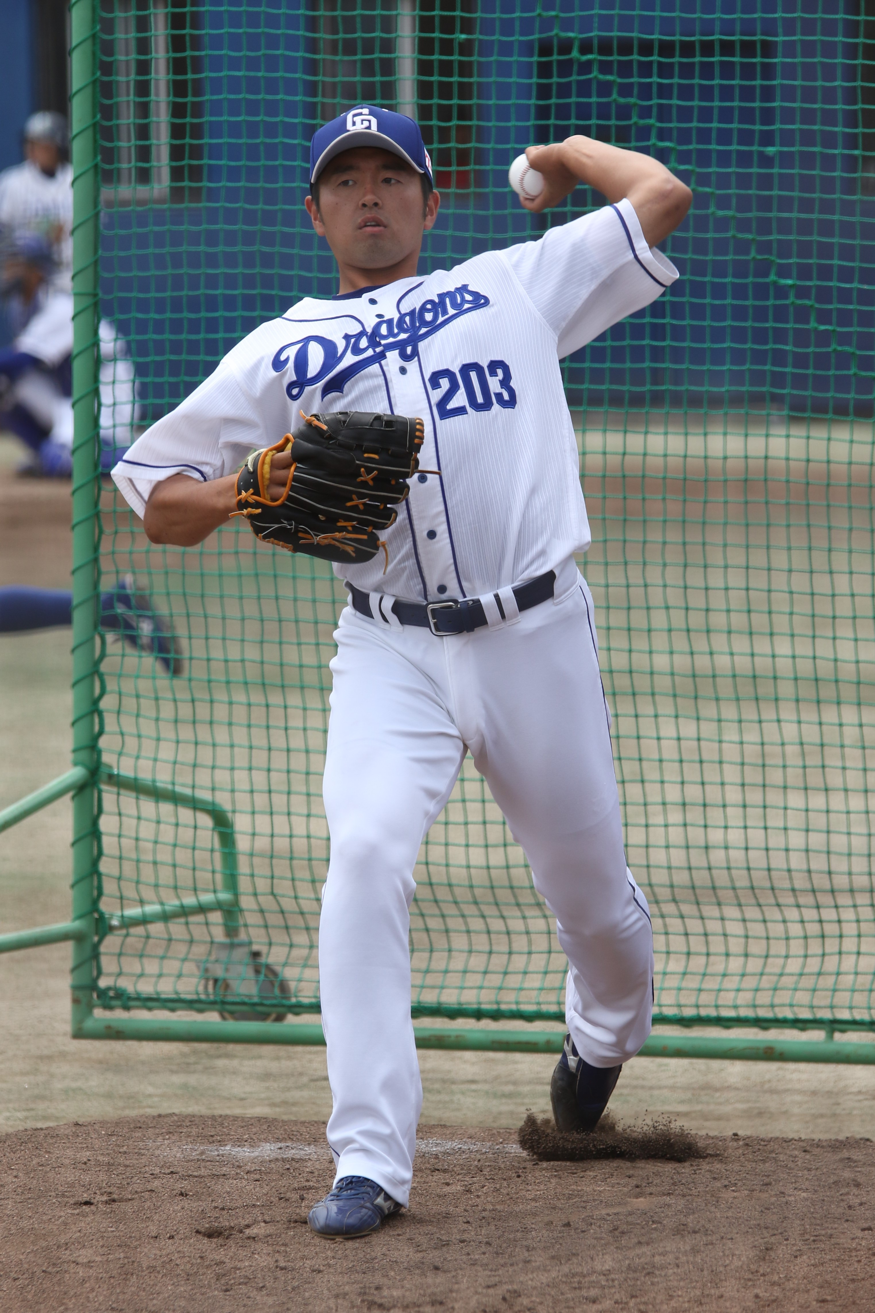 2019年6月23日、ナゴヤ球場にて